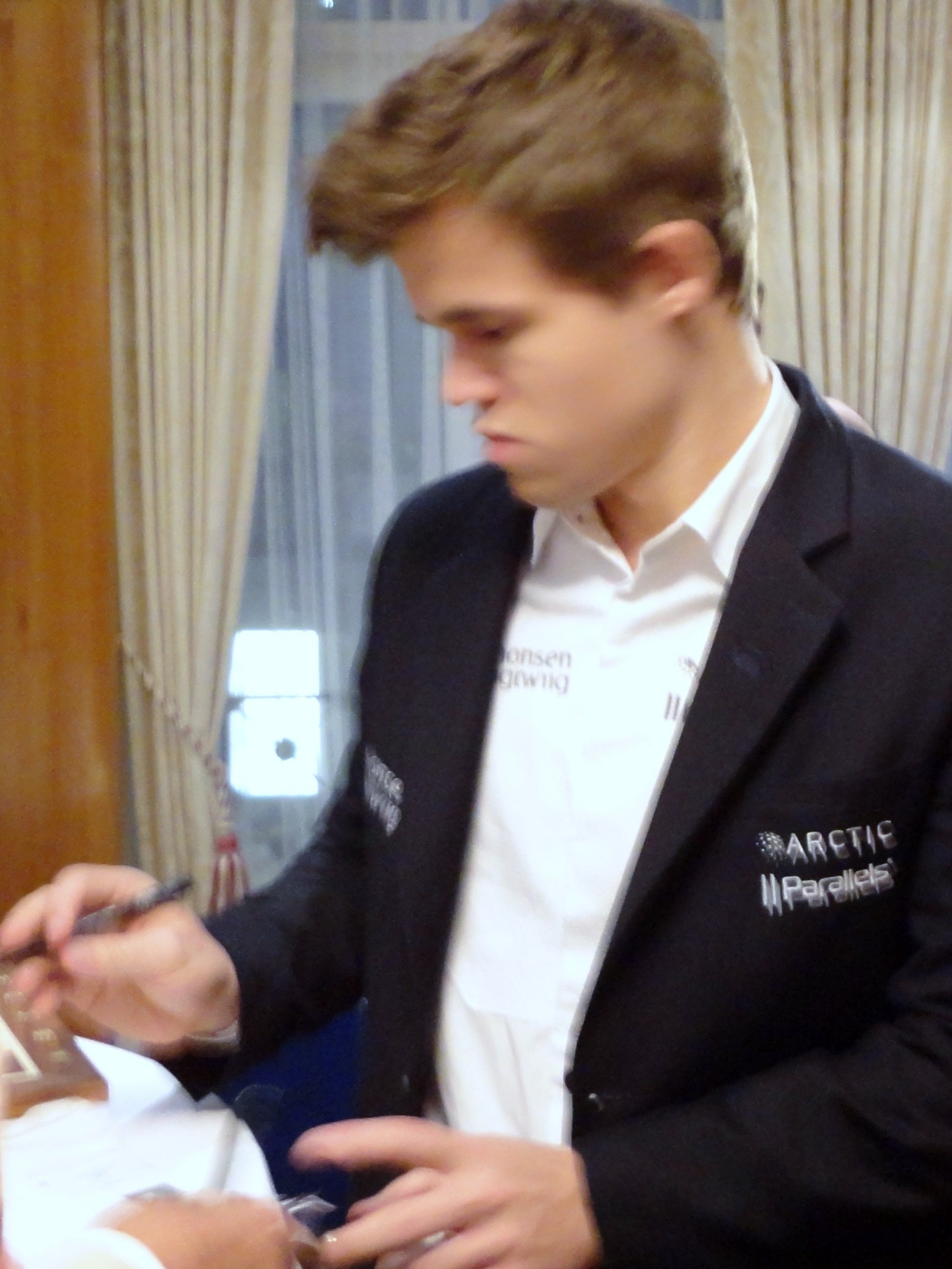 Magnus Carlsen, ZURICH CHESS CHALLENGE 2014, Rapid Chess am 4. Februar 2014 in Zürich / Schweiz.